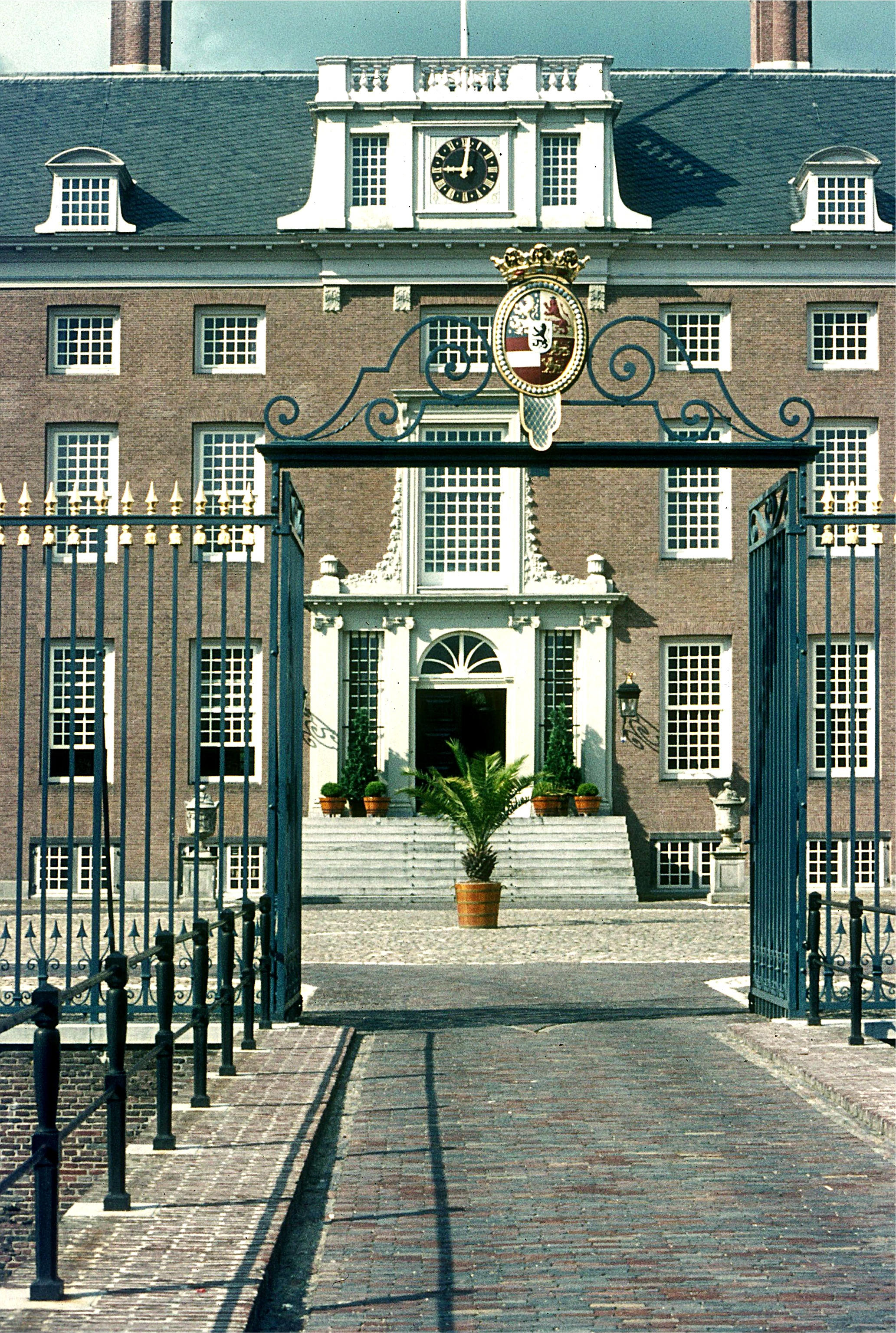 Schloss Zeist, Niederlande, Einfahrt